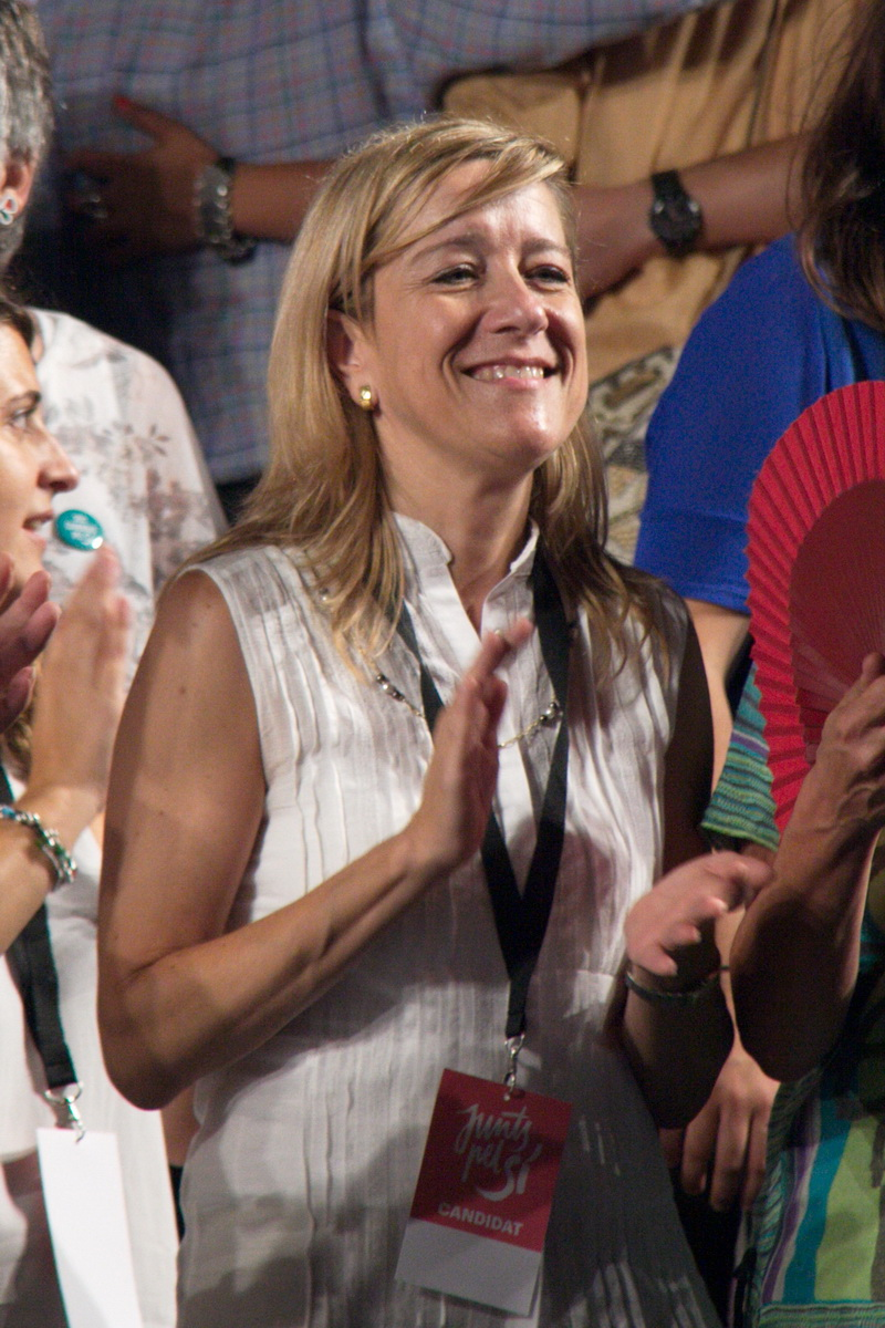 Acte de presentació de tots els candidats de la llista Junts pel Sí a Barcelona, al Psg.Lluís Companys. (28-8-2015)